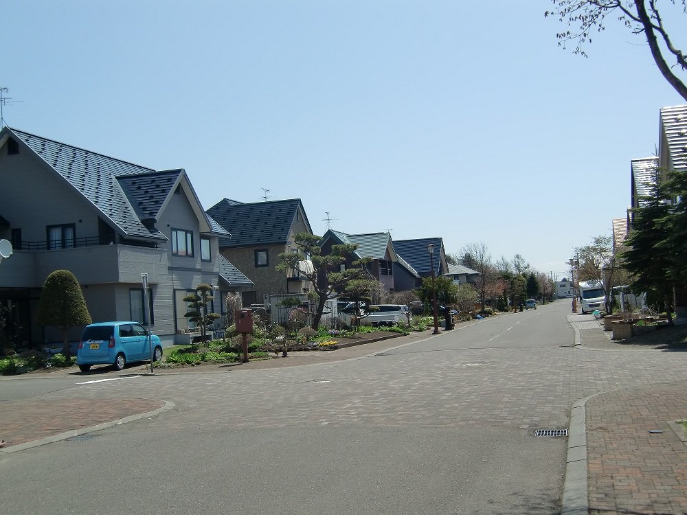 恵み野風景2